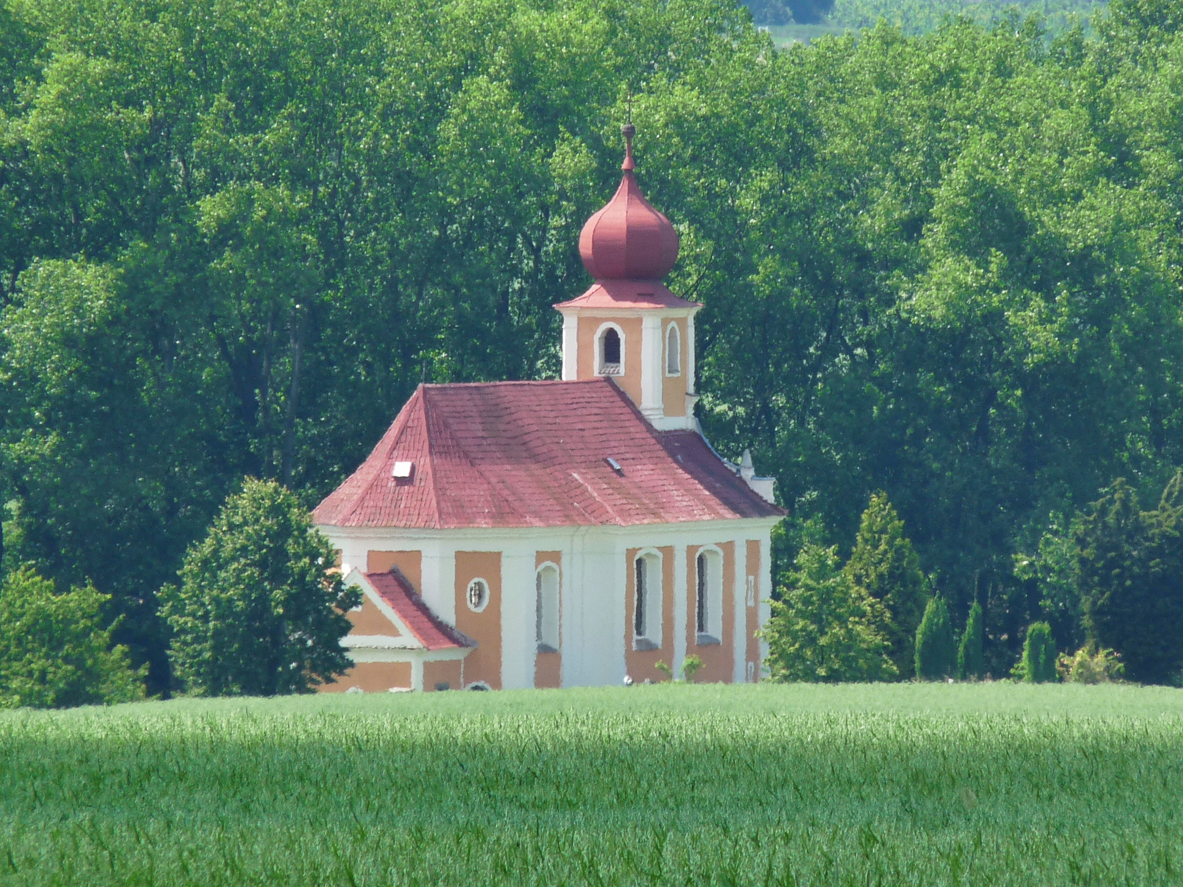 Kostel sv. Martina, Přívětice